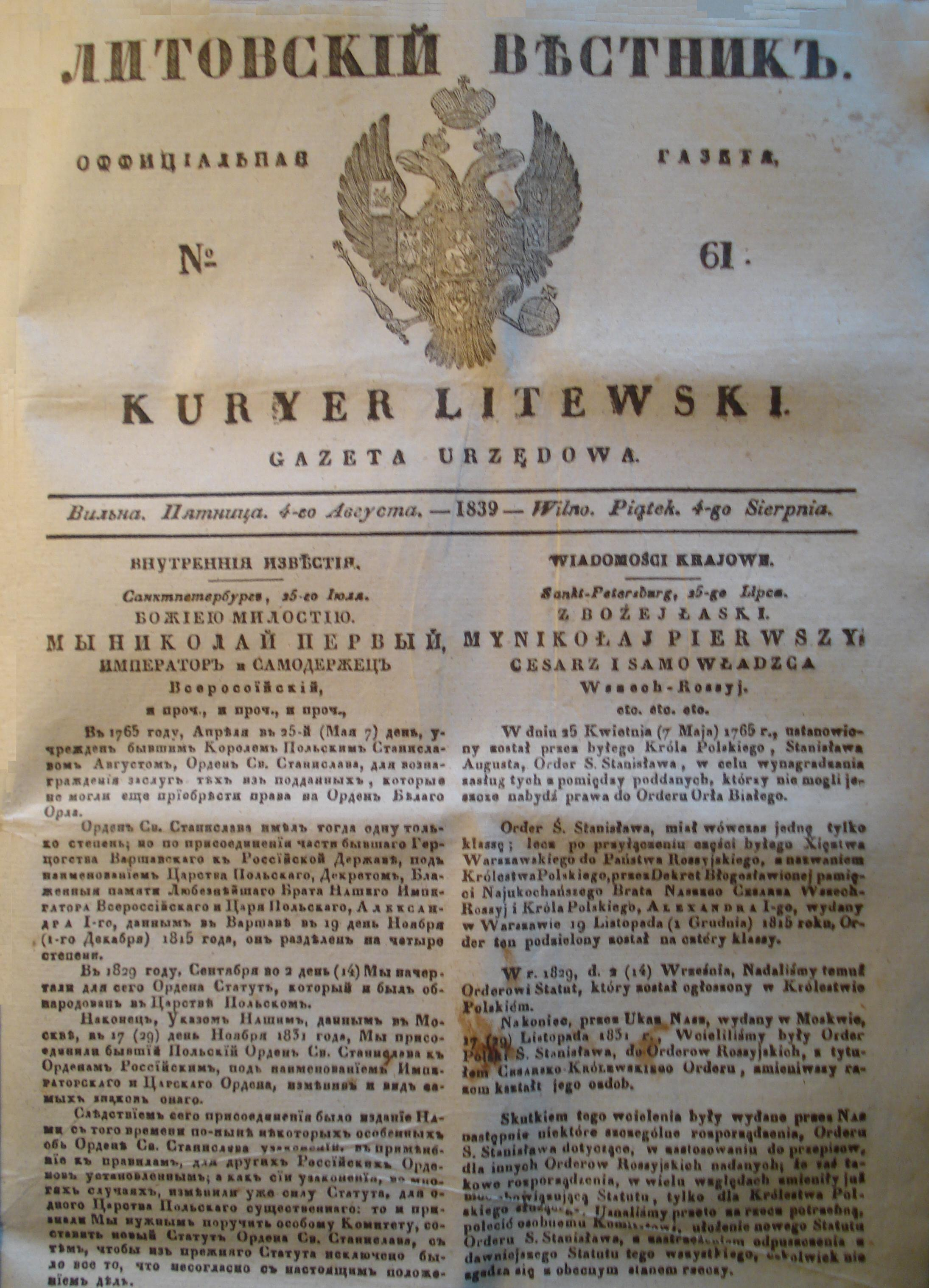 Kuryer Litewski. Newspaper printed in Wilno. 1839. Литовский вестник. 1839.